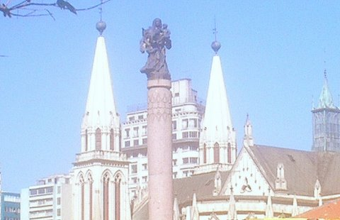 Memorial a Nossa Senhora da Luz dos Pinhais, em Curitiba, Paraná, Brasil. Dedicado à padroeira da cidade, é uma escultura em bronze da imagem da santa medindo 2,5m e pesando 650 quilos, sobre um pedestal cilíndrico de 10m de altura. O molde em gesso foi confeccionado pela artista plástica Maria Inês Di Bella e o projeto em bronze executado pela Fundição Adalberto Baso. Ao fundo da imagem, as torres da Catedral Basílica de Curitiba.